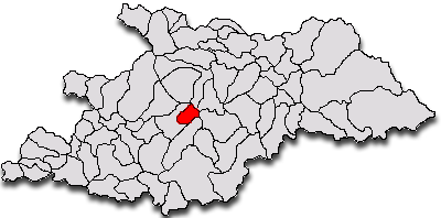 Categorie:Hărţi ale judeţului Maramureş